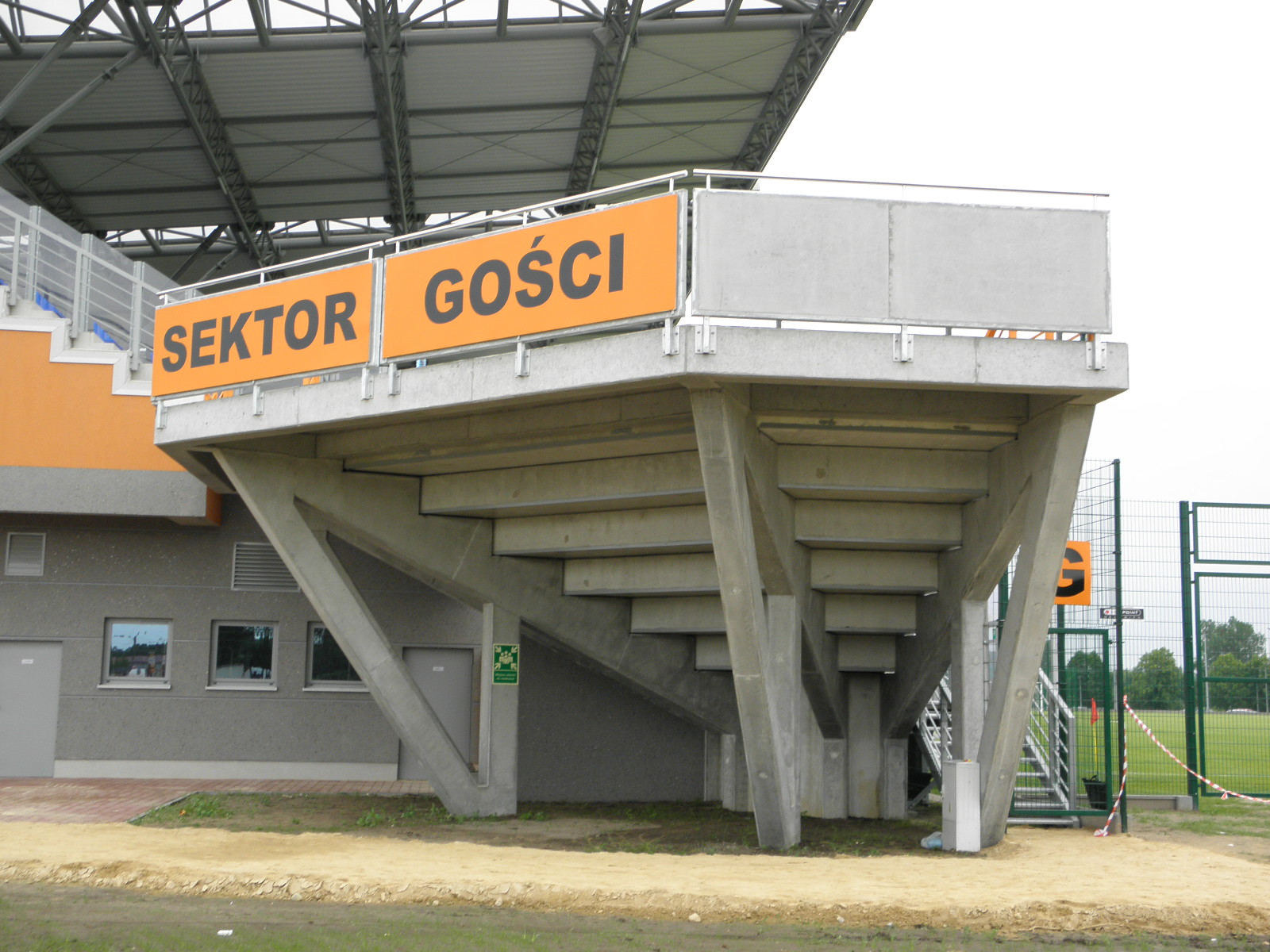 Siedlce-stadion na Błoniach-sektor gości